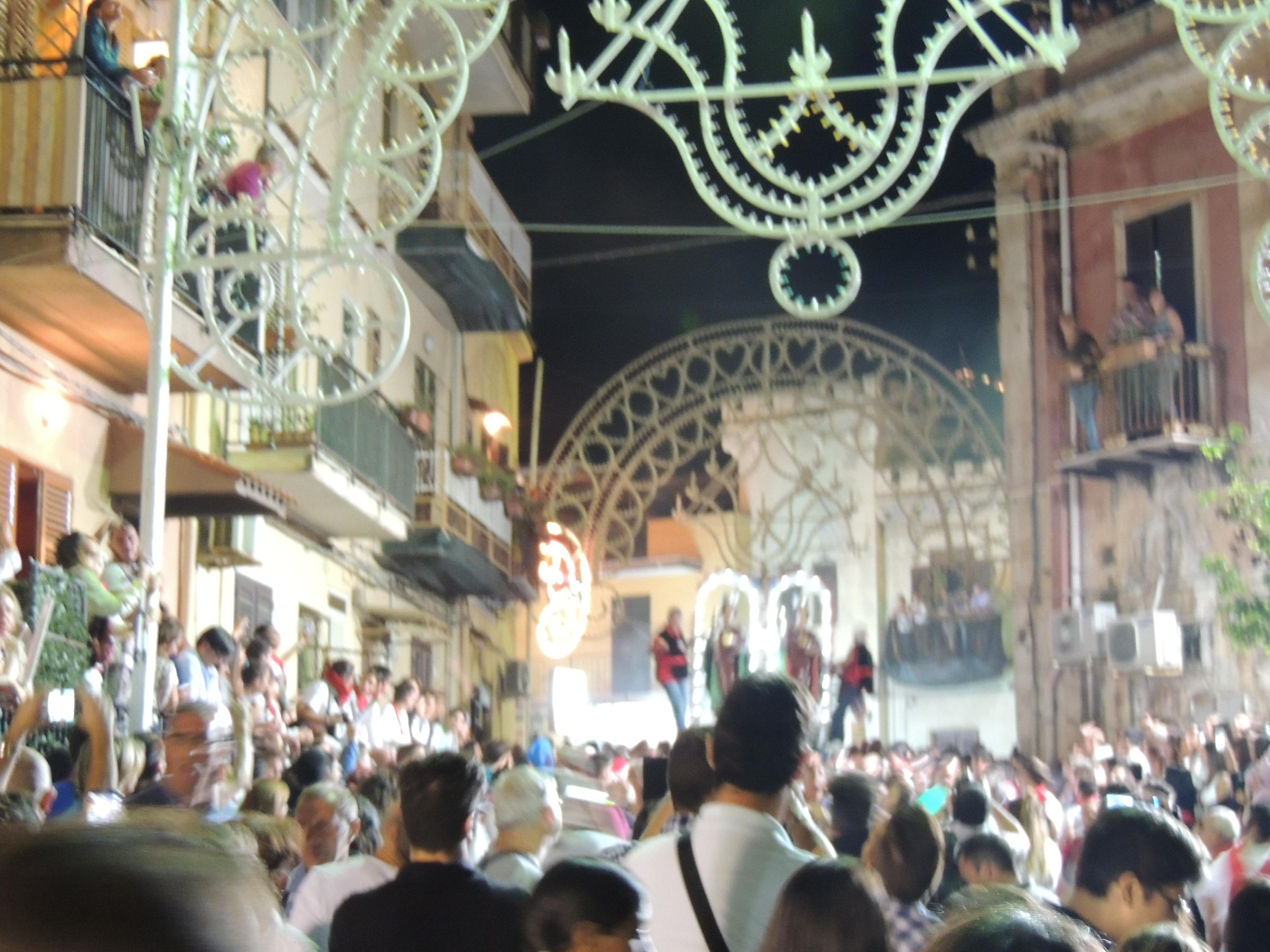 Festa dei santi patroni a Sferracavallo